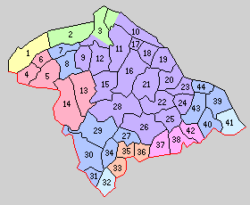 千葉県香取郡の町村。